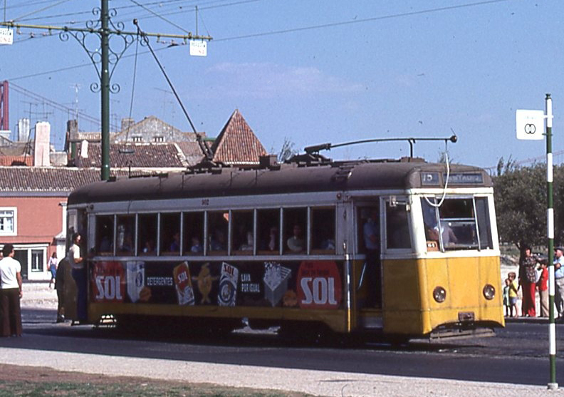 Ligne 15, direction ESTADIO ( cette ligne existe encore à ce jour, mais avec des trams modernes, et la ligne ne va plus à ESTADIO. Rua Bartolomeu Dias Tram 902 de la série 901-910